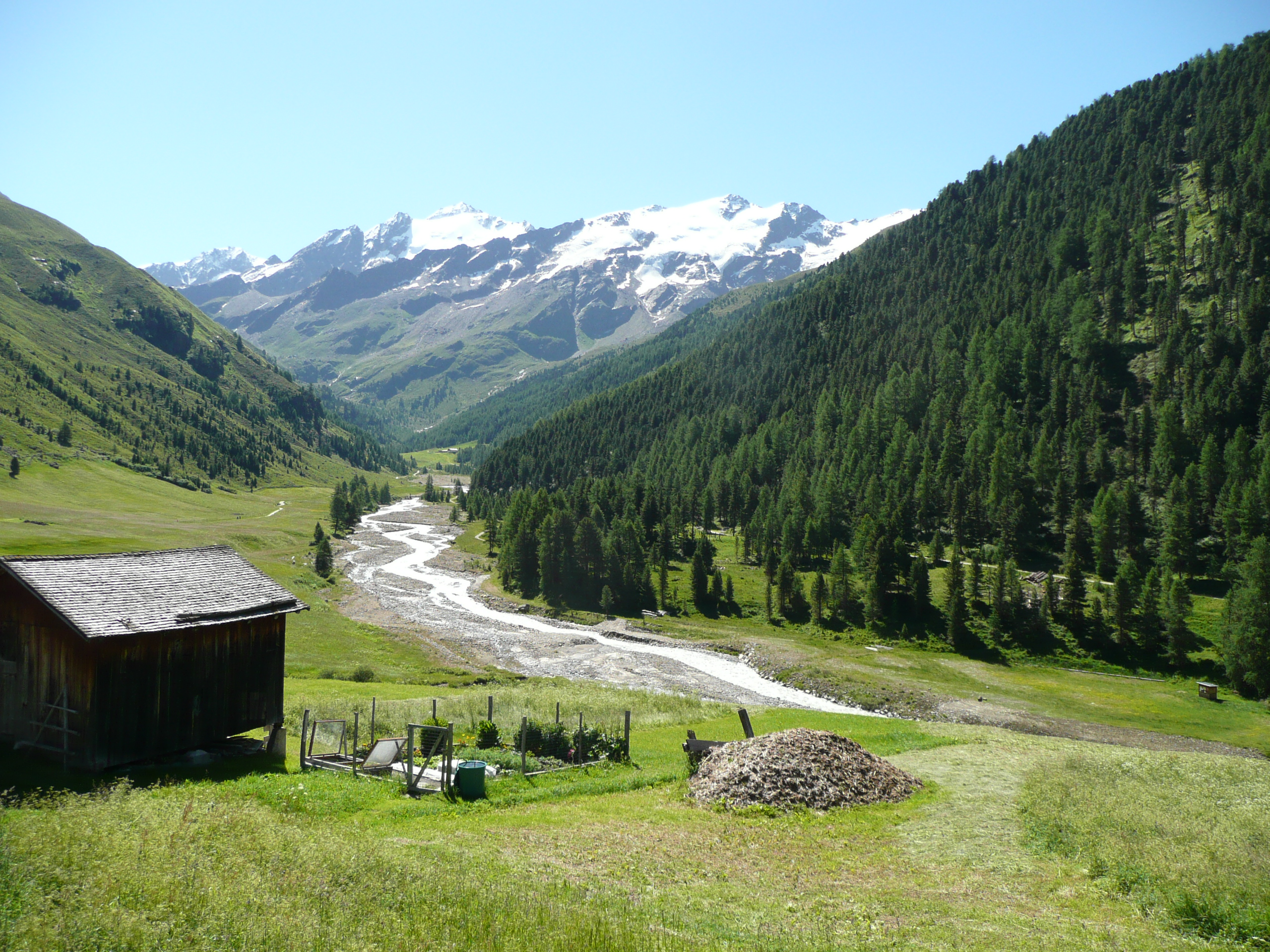 da Melago